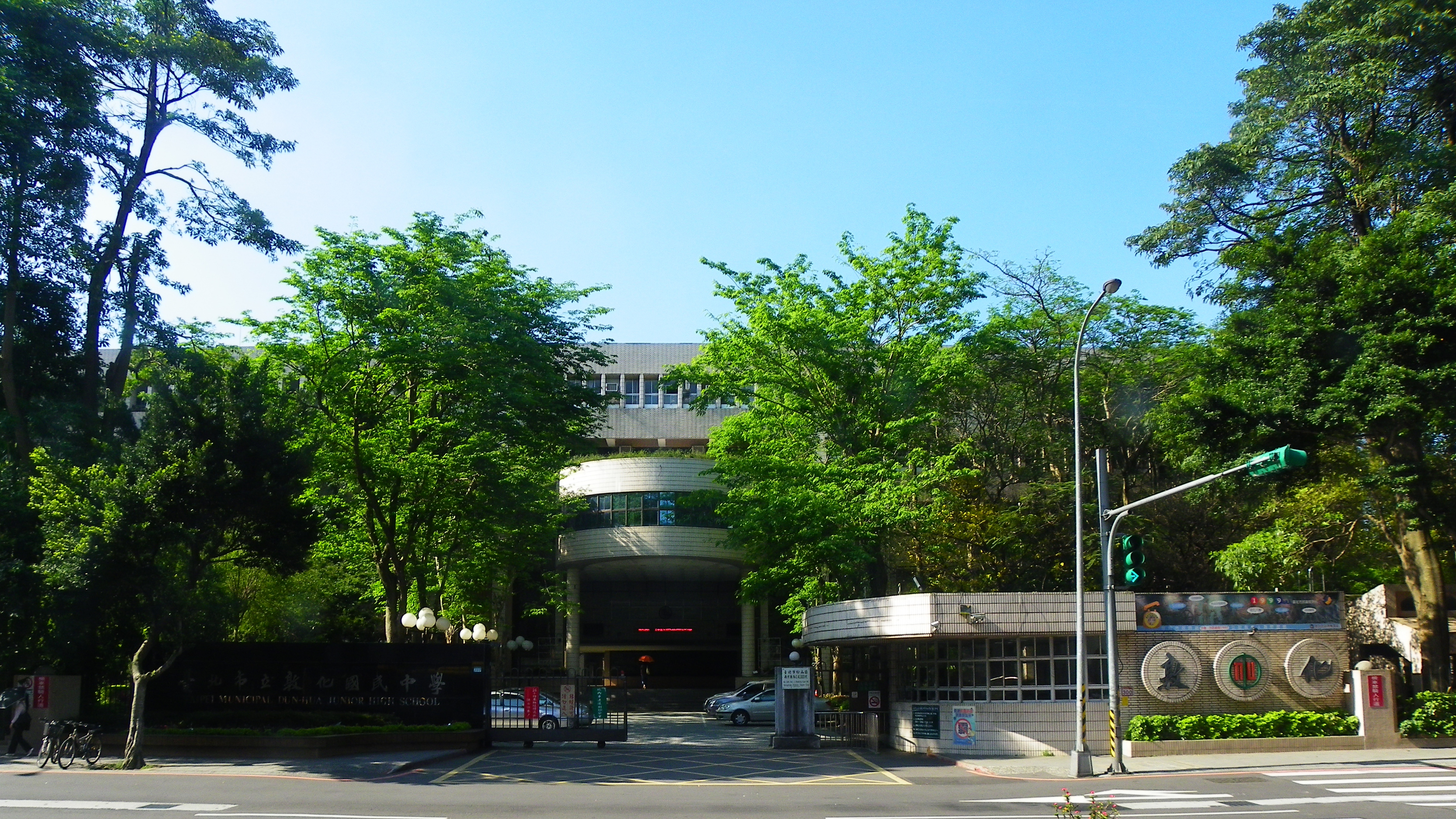 台北市立敦化国民中学の正門前。